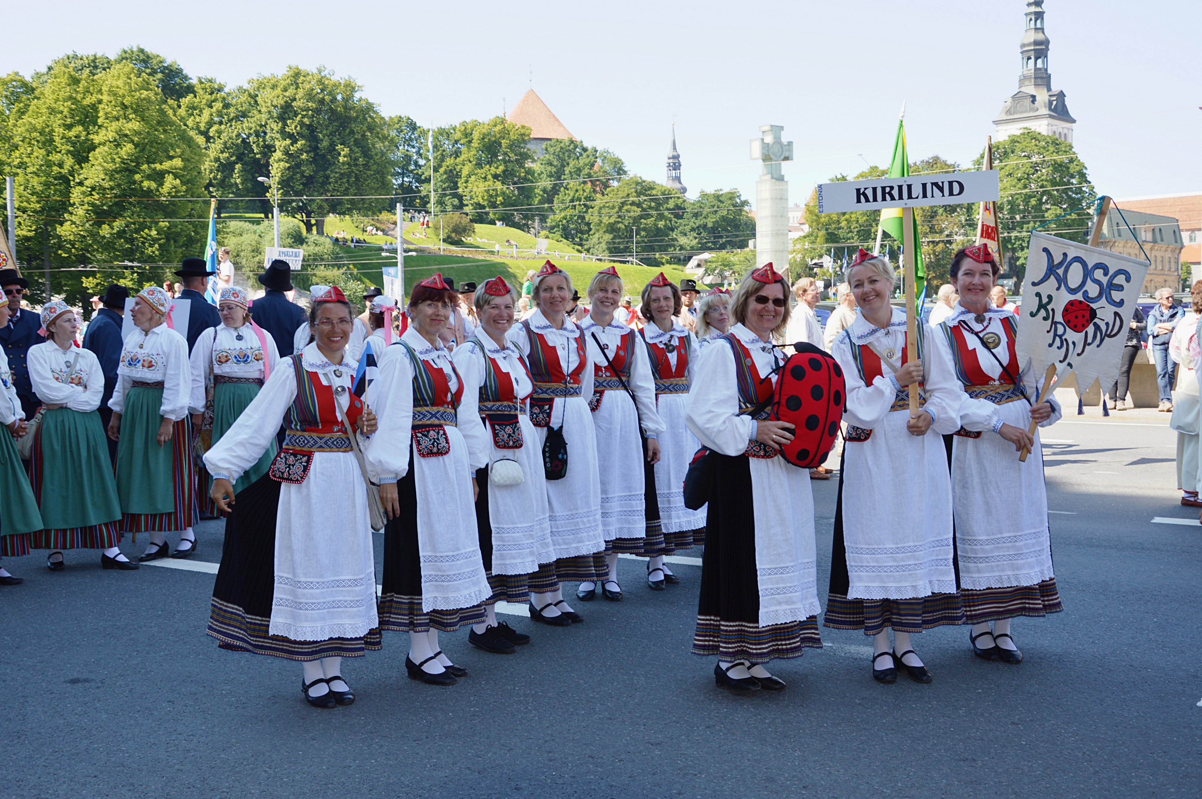 Kose Kirilind laulupeo rongkäigus 2014.